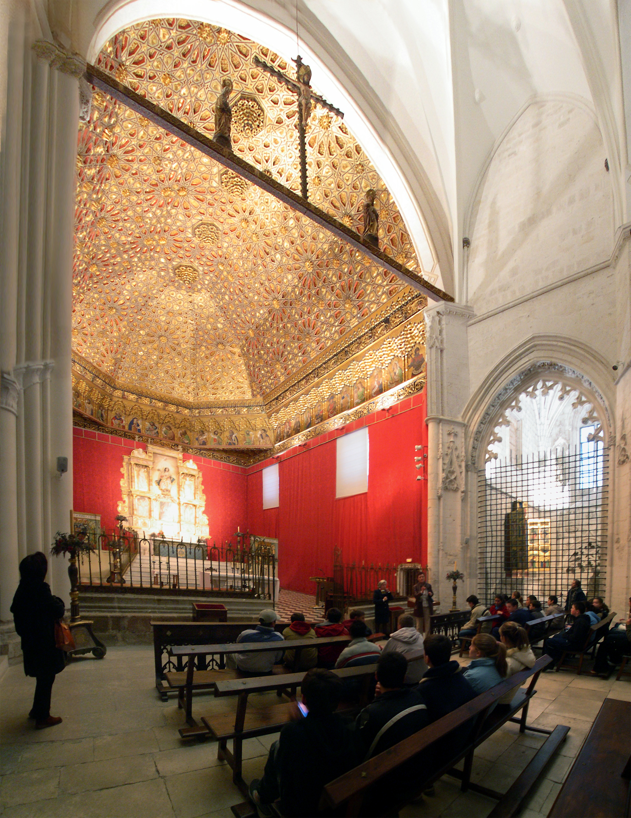 Otra vista de la capilla principal del real monasterio-palacio de Las Claras, en Tordesillas (Valladolid, España)